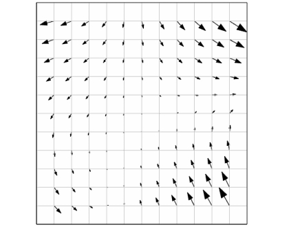 Optimierungsalgorithmus bei Verwendung von 4 Kamerapunkten